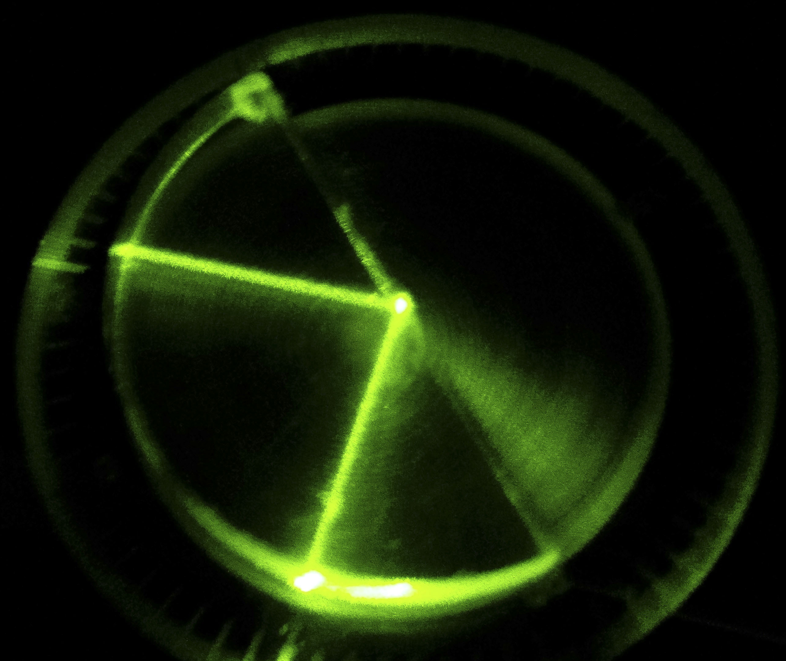 Láser reflectado usando un semidisco de lucita, Foto tomada en el laboratorio de óptica de la facultad de ciencias de la unam.